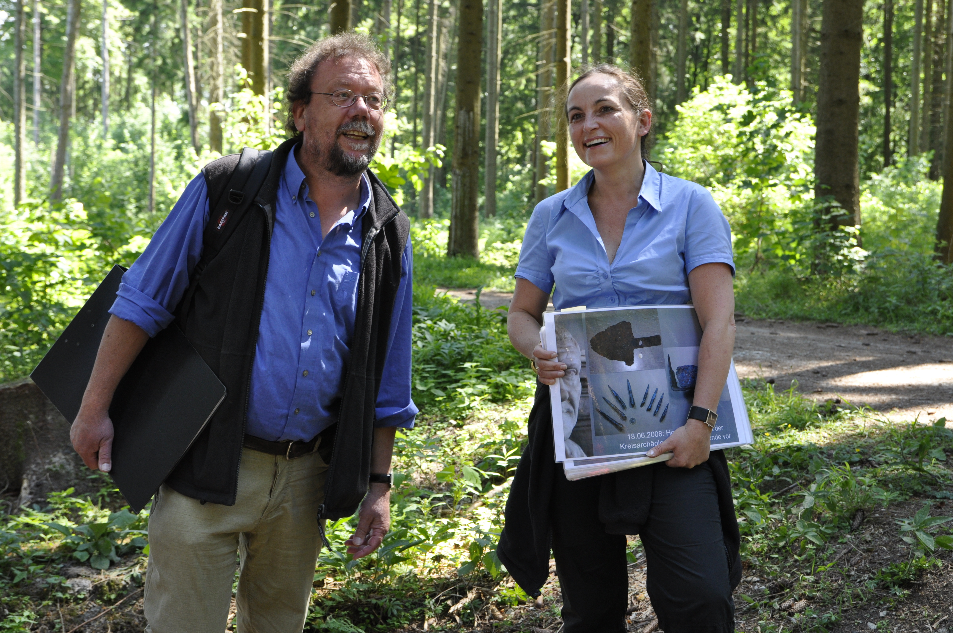 "Die Wikipedianer kommen" im Braunschweigischen Landesmuseum.